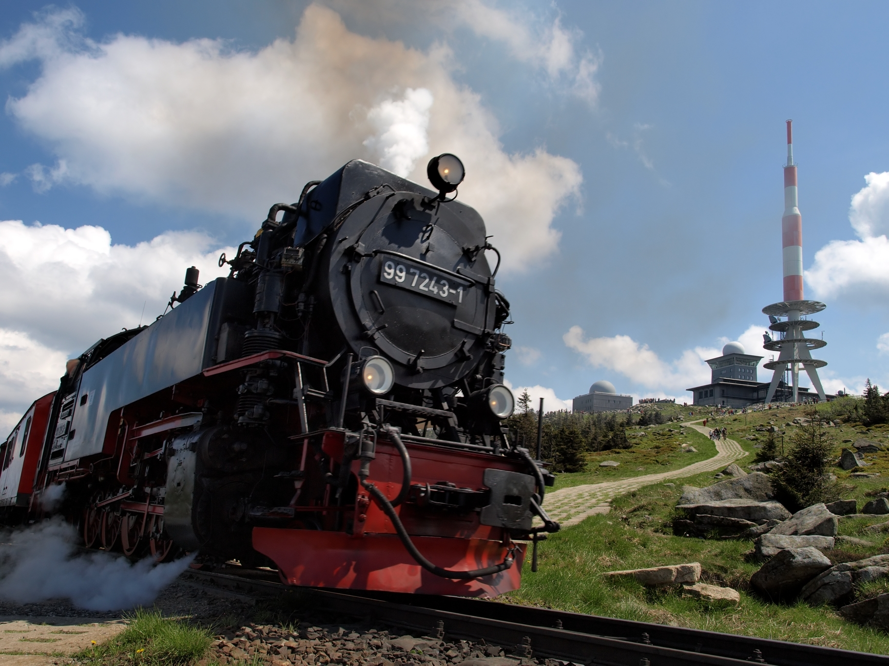 Die Brockenbahn am Heinrich Heine Weg (ehem. Panzerstr.). Im Hintergrund der Brockengipfel mit Sendeturm und Brockenhaus.